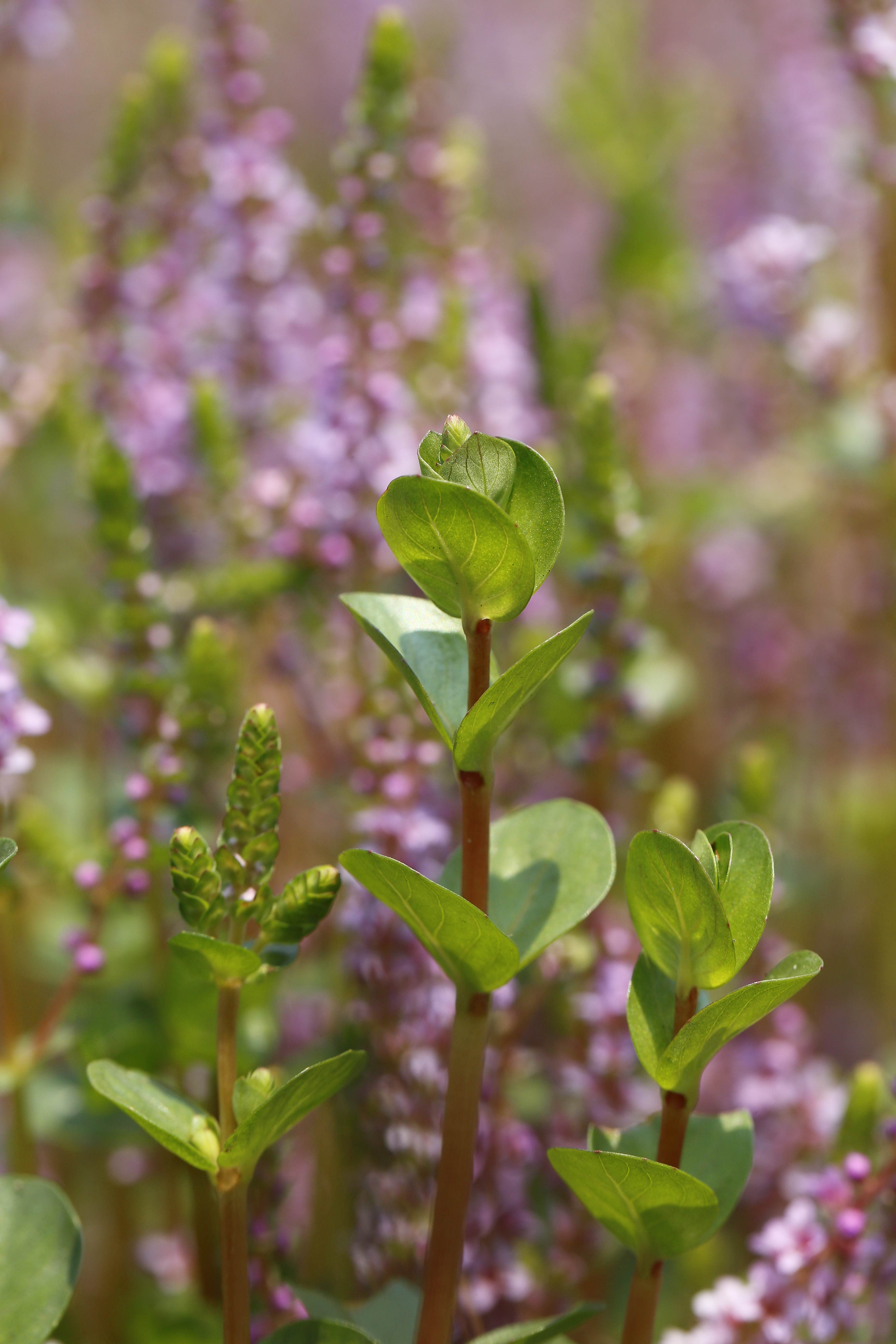 中文（台灣）: 圓葉節節菜的葉-a